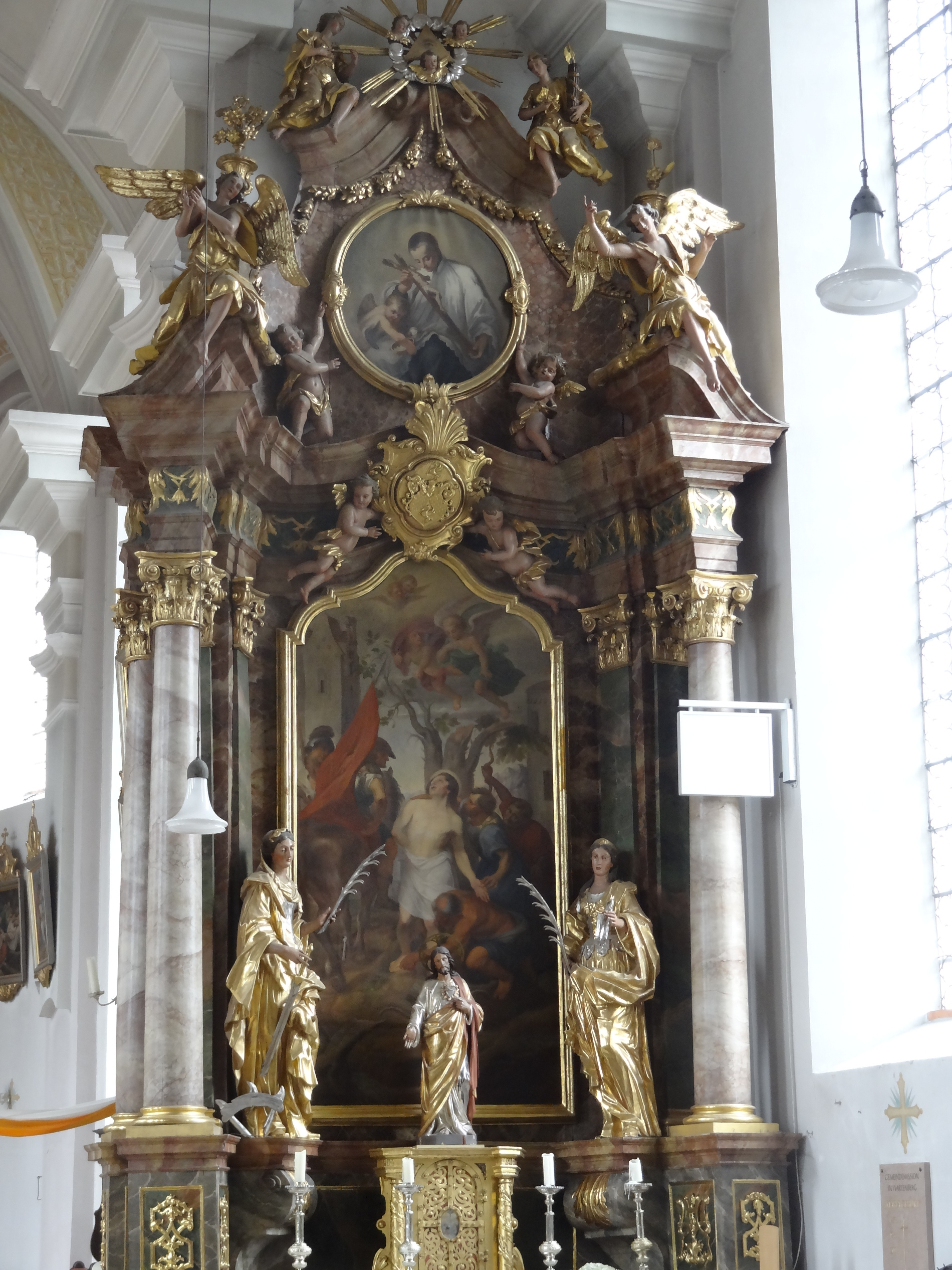 Rechter Seitenaltar der kath. Pfarrkirche Mariä Geburt im Markt Wartenberg (Landkreis Erding, Oberbayern)